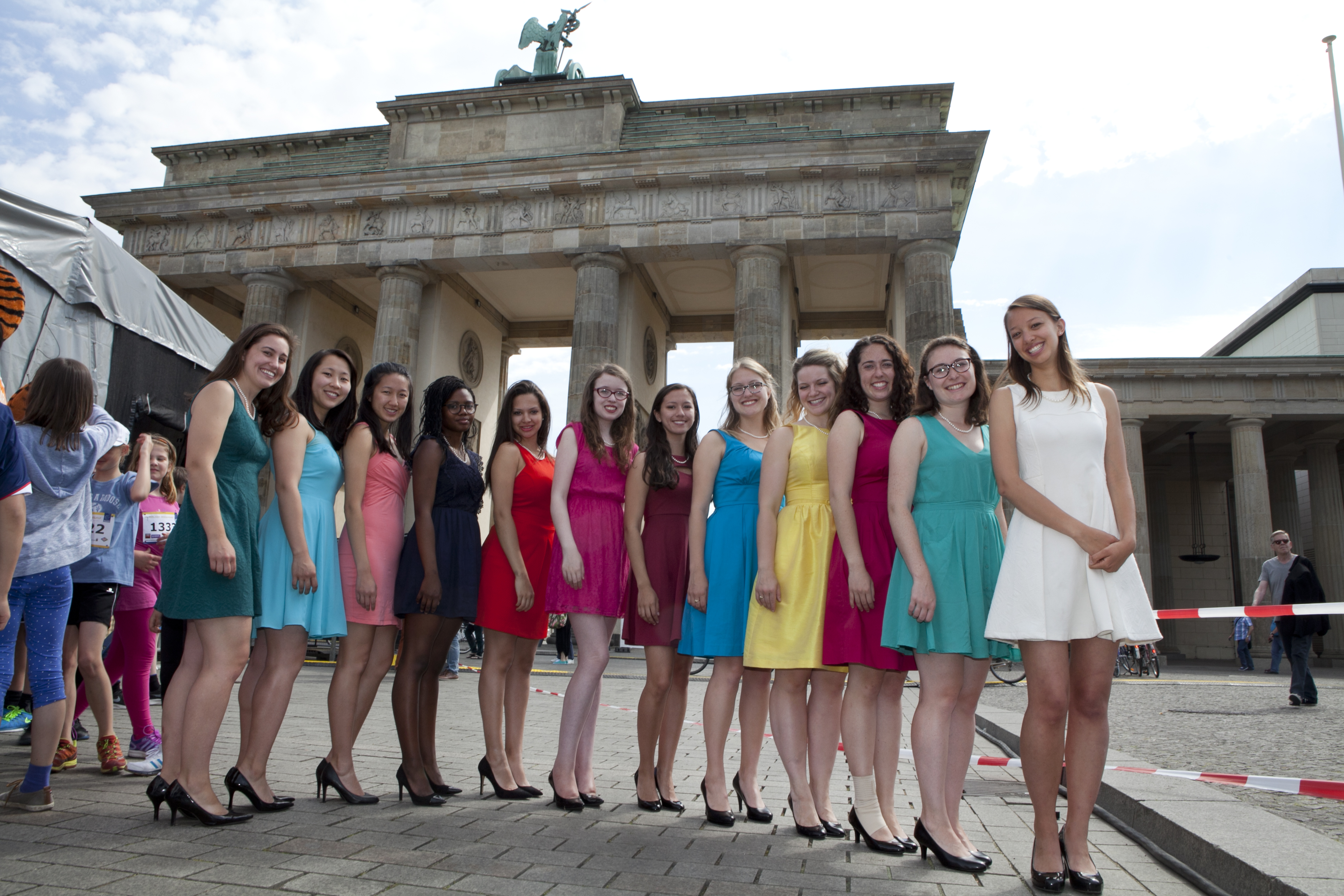 The Radcliffe Pitches at the Brandenburg Gate in Berlin, 2015